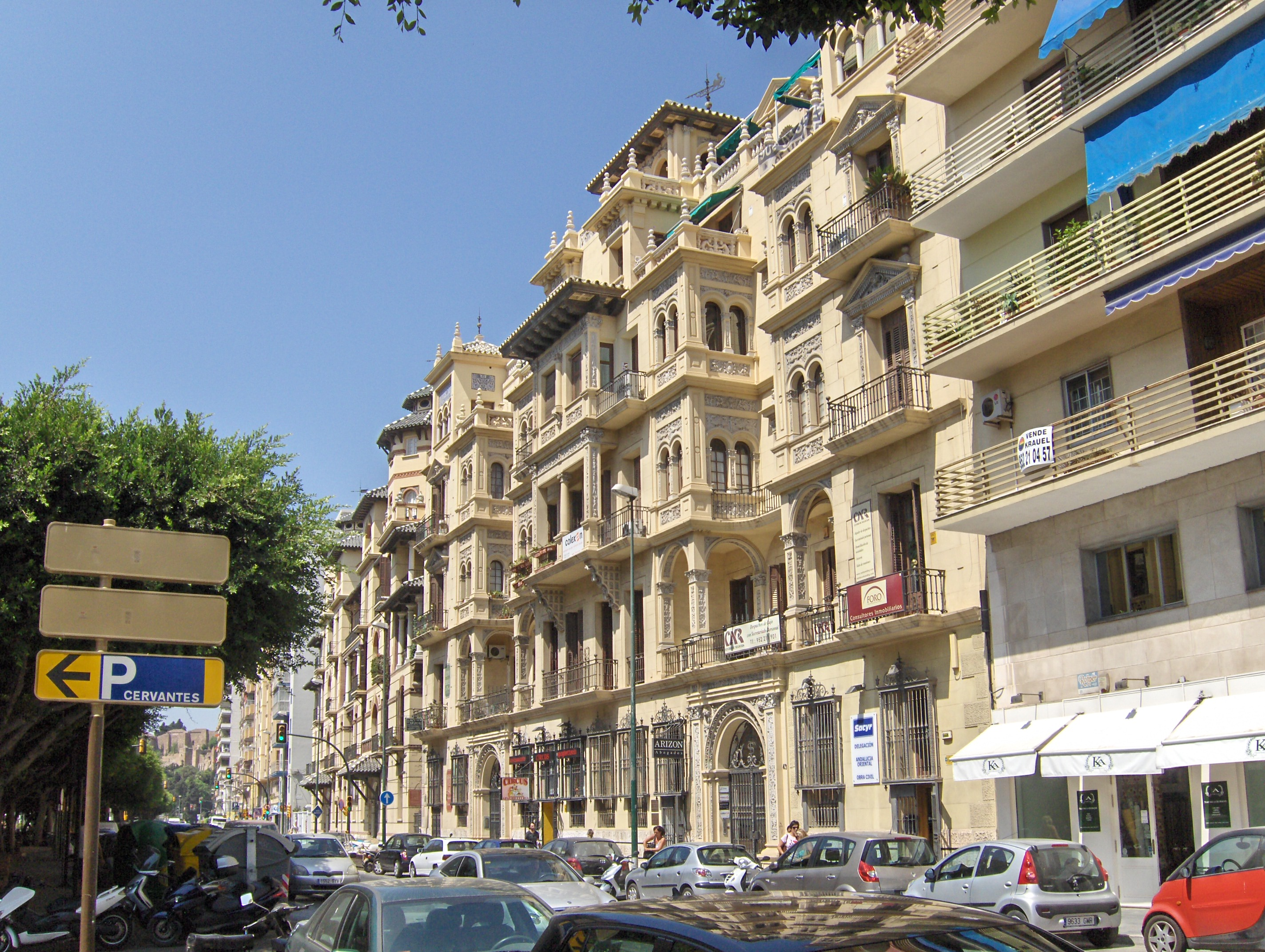 Casas de Félix Sáenz, Paseo de Reding, Málaga, España. Arquitecto: Fernando Guerrero Strachan, 1922.